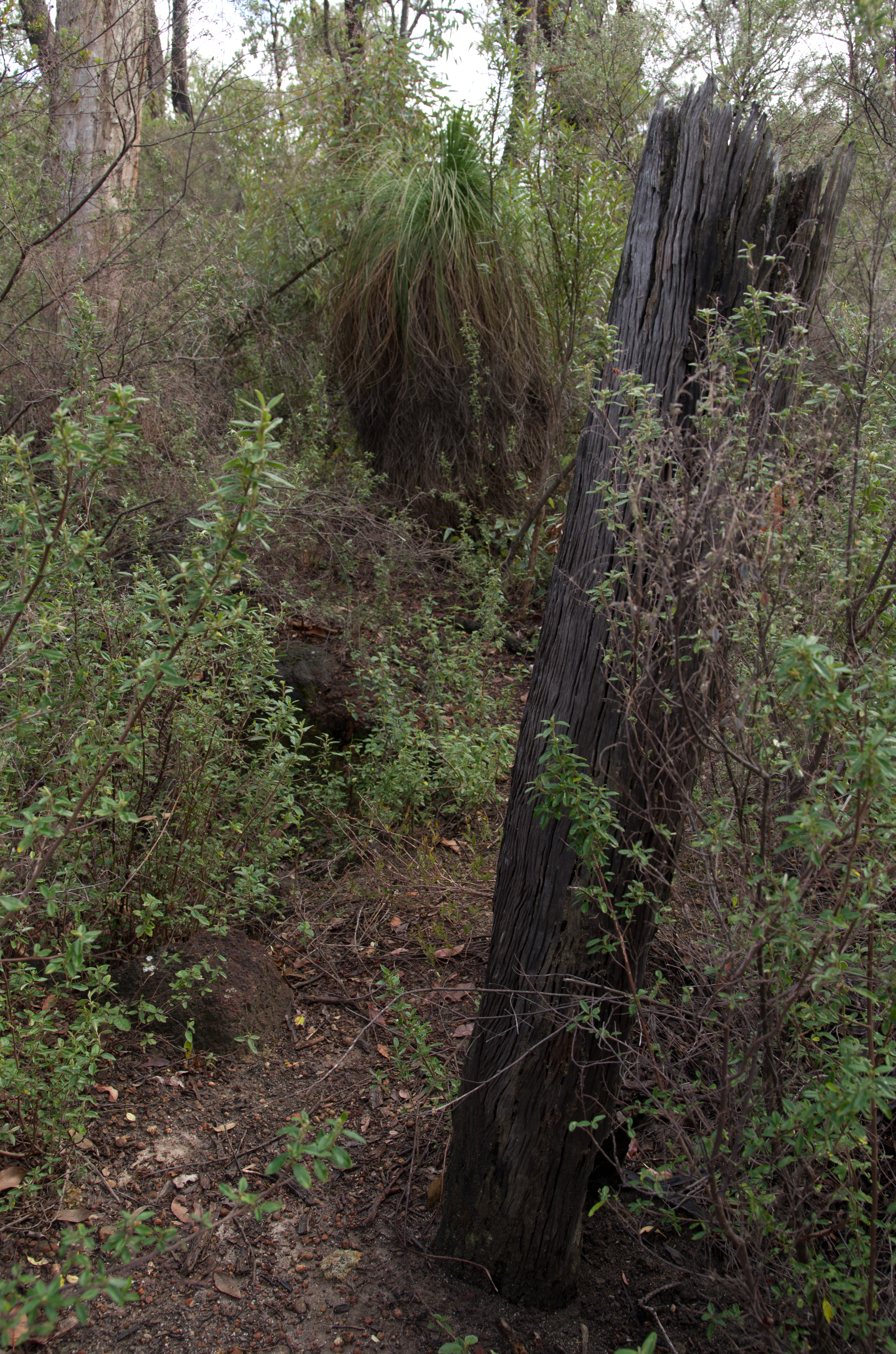 Moondyne Joe's well